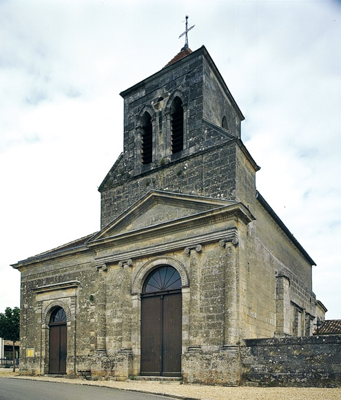 Asques église St Jean